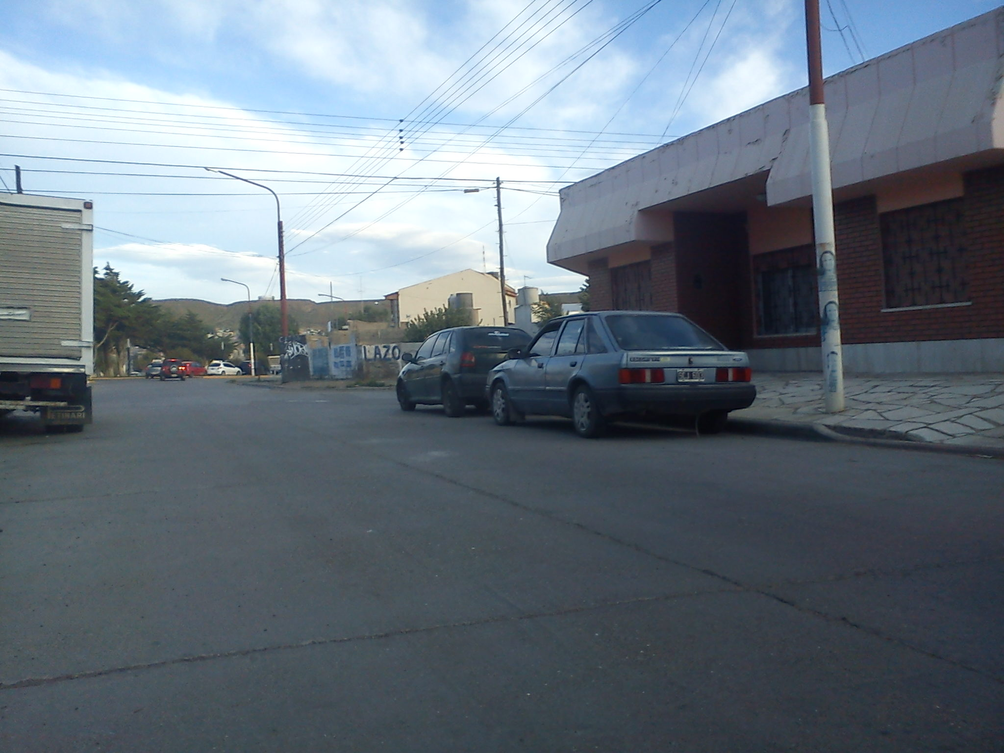 Bo. San Martin, Caleta Olivia